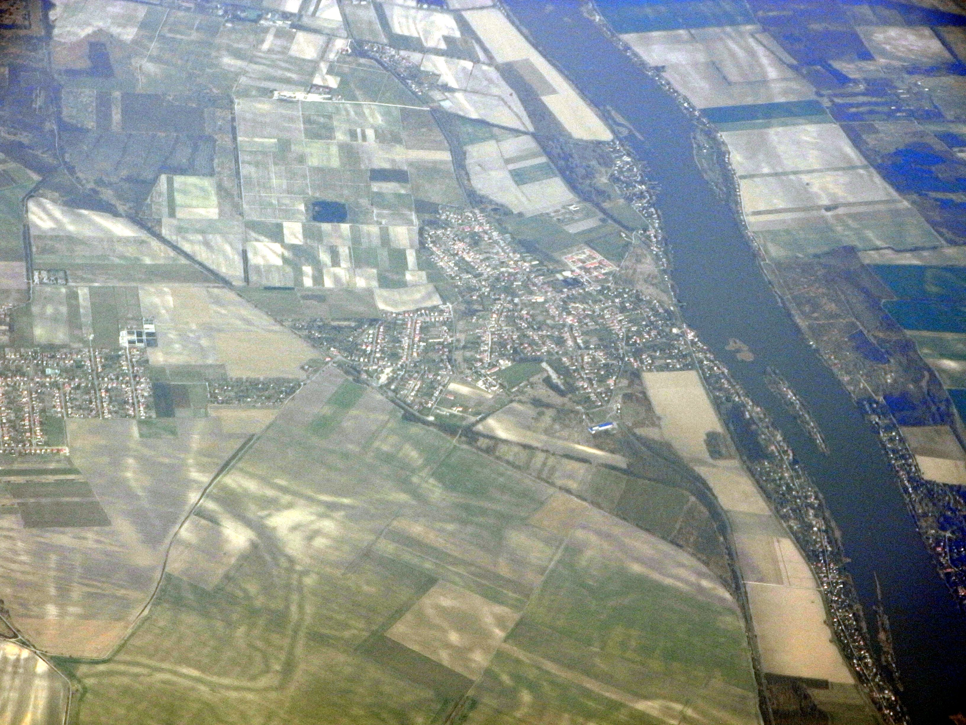 El-aera vido de Szigetszentmárton (dekstre); maldekstre Szigetújfalu.